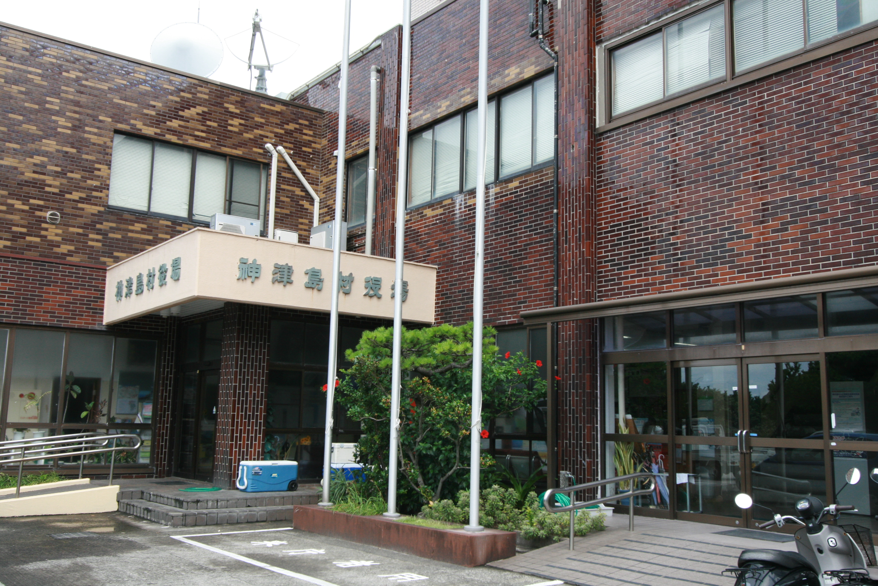 神津島村の村役場